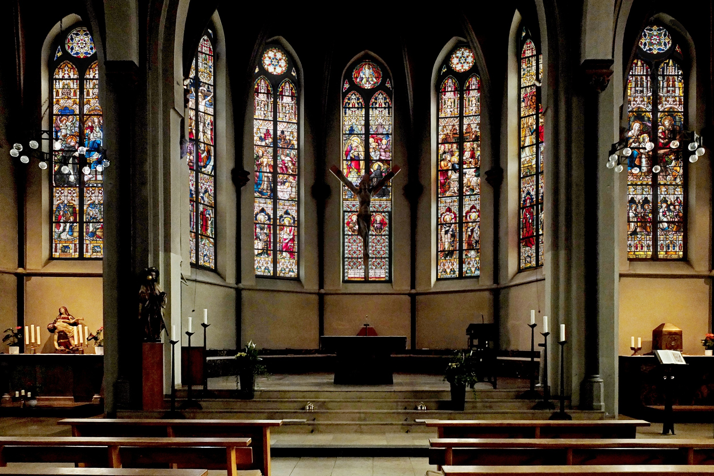 Sakrale Buntglasfenster in der St.-Jacobus-Kirche, Hilden